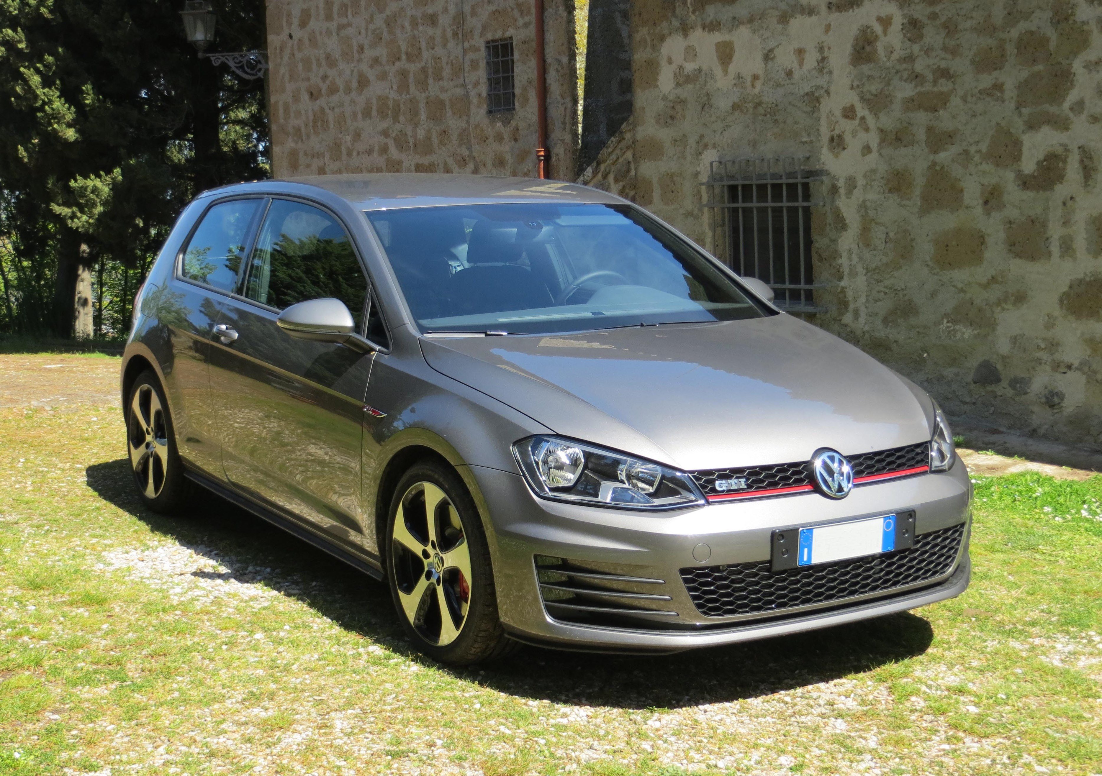 Golf GTI VII serie, versione Performance DSG Motore 2.0 turbo benzina. Potenza 230 CV Coppia 350 Nm Velocità 250 km/h (autolimitata). Cambio doppia frizione DSG a 6 rapporti. Freni a disco autoventilati ant. 340 mm. post 310 mm. Differenziale autobloccante meccanico a controllo elettronico. Foto scattata da me il 20.4.14 a Orvieto